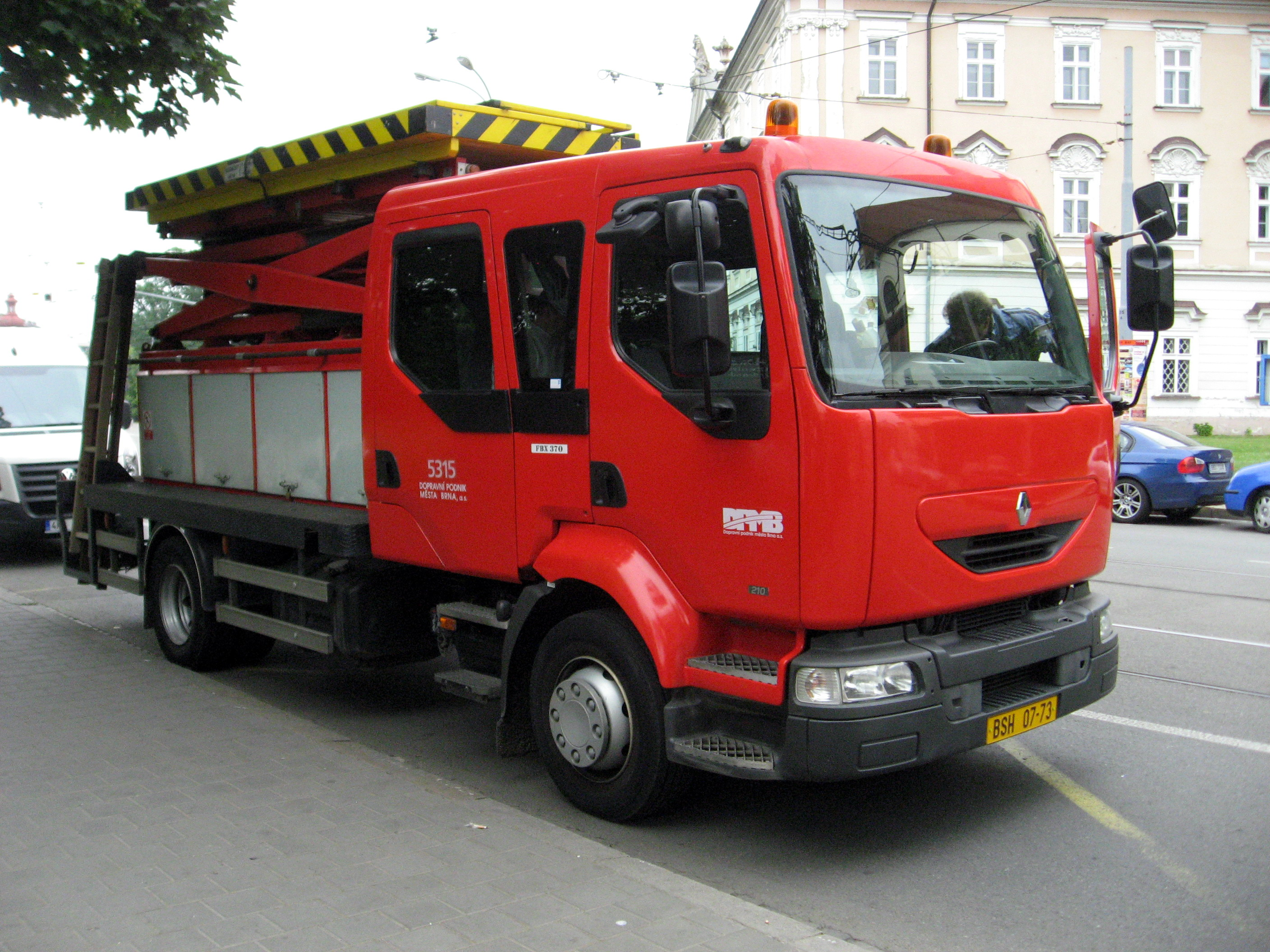 DPMB, vůz číslo 5315